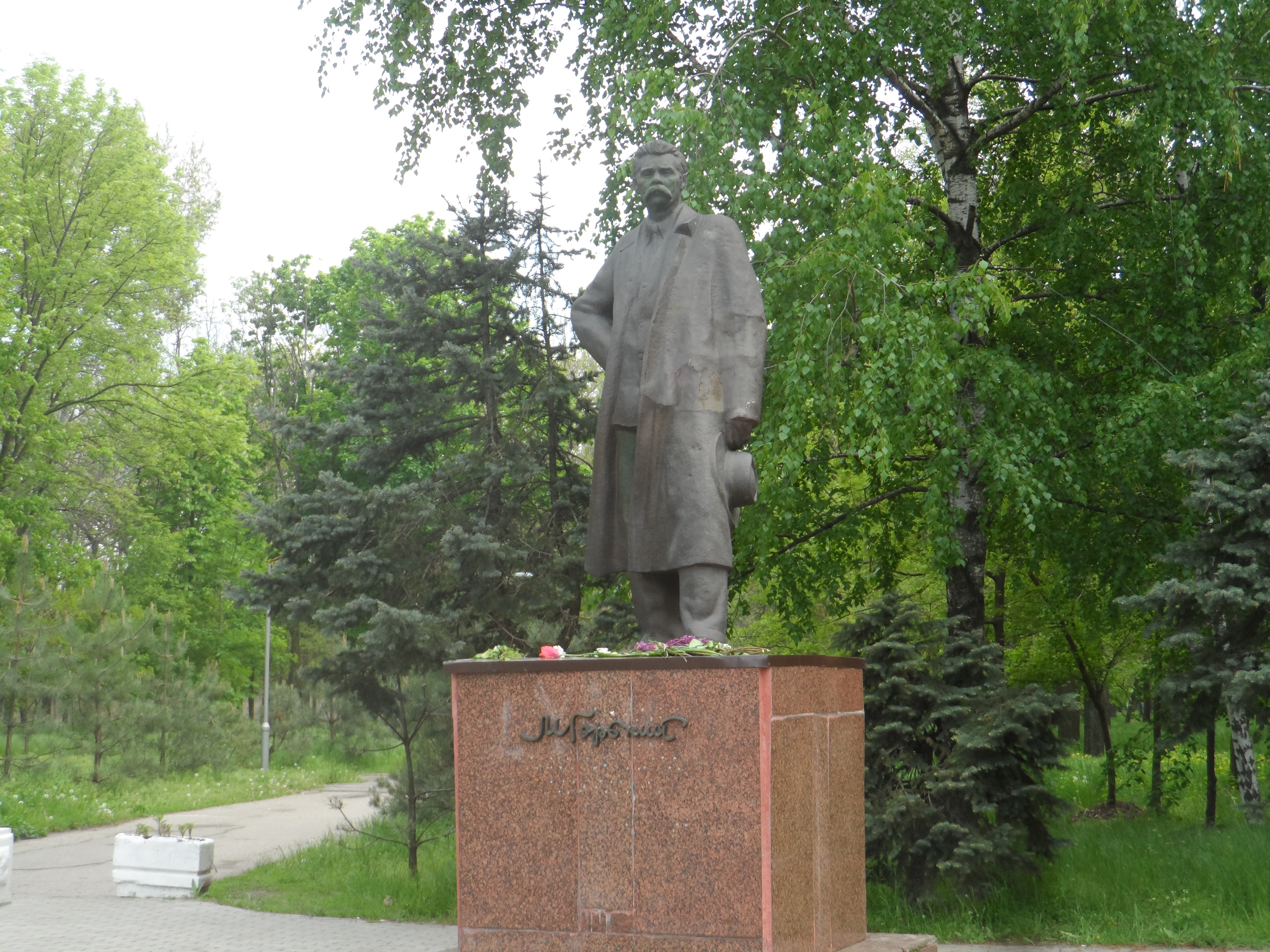 Мелитополь